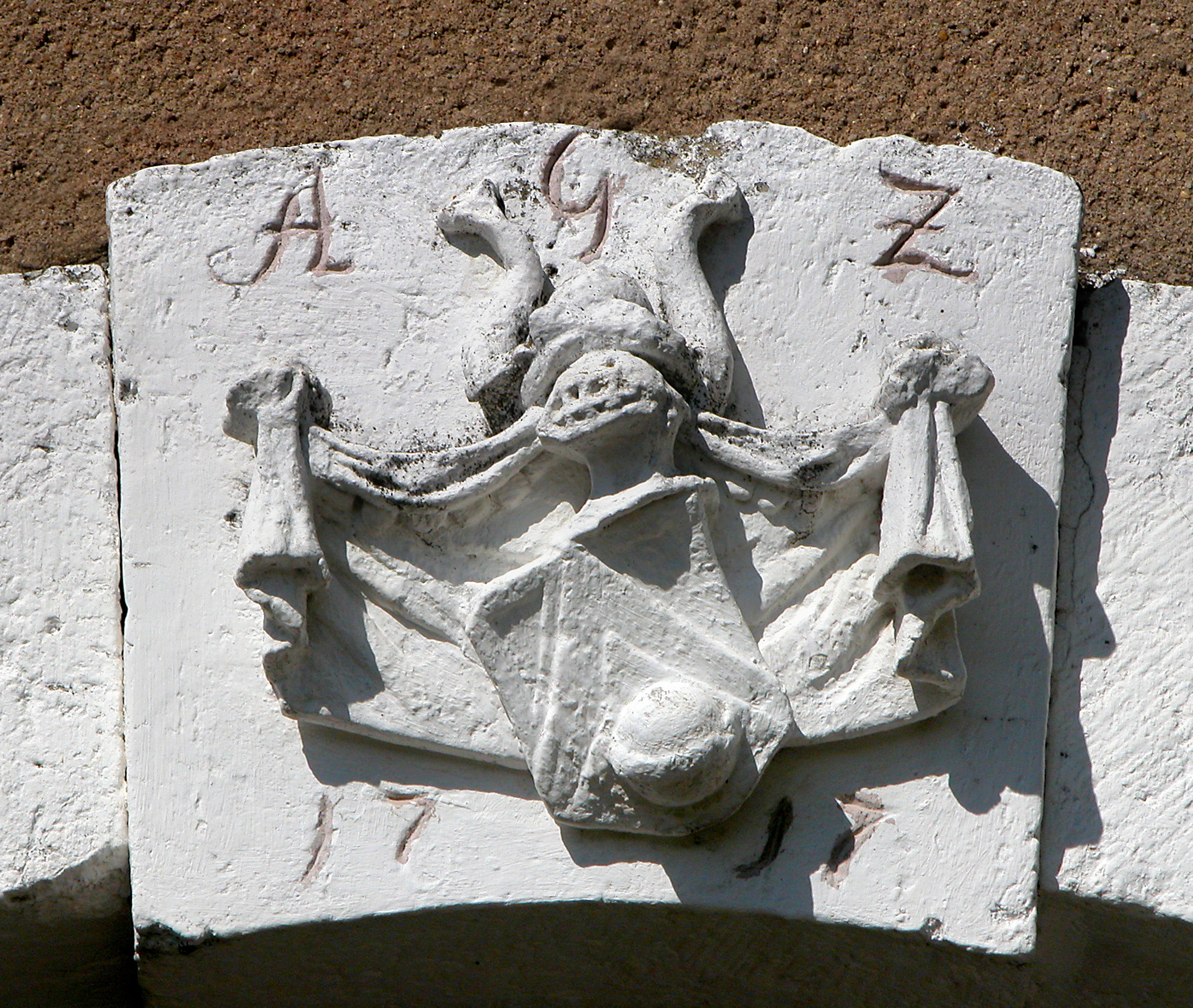 15.05.2015 01877 Pottschapplitz (zu Demitz-Thumitz): Rittergut, Wappenschlußstein am Portal des Herrenhauses. Ringstr. 6 [DSCN5751.JPG]20150515390DR.JPG(c)Blobelt